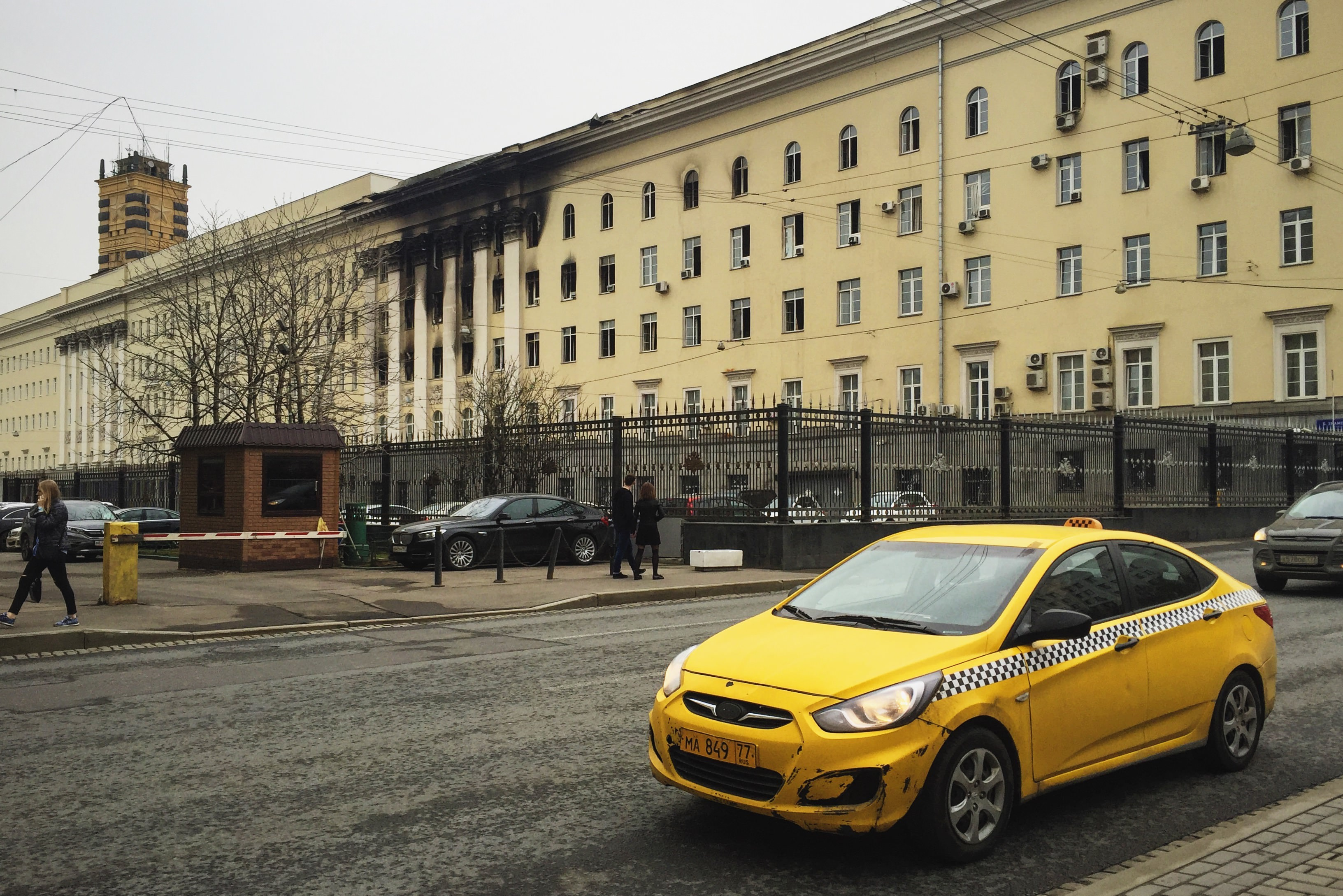 Знаменка Moscow in 2016; Москва в 2016